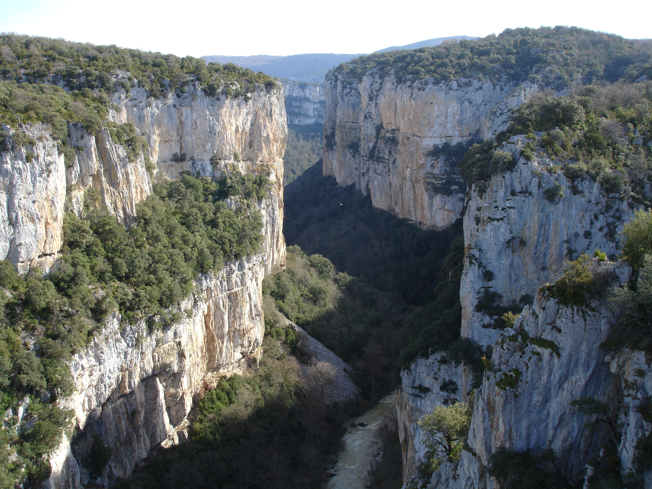 Foz de Arbayún vista desde el mirador. Photograph by comakut.